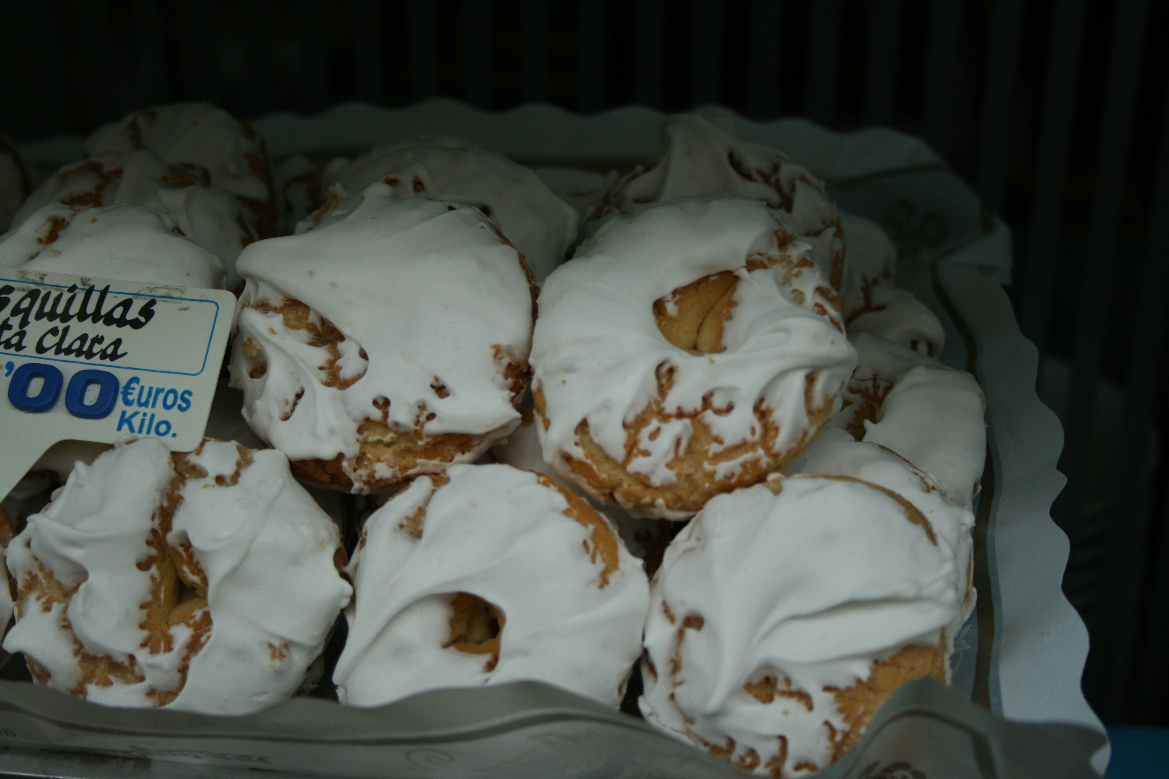 Rosquillas de Santa Clara - Madrid